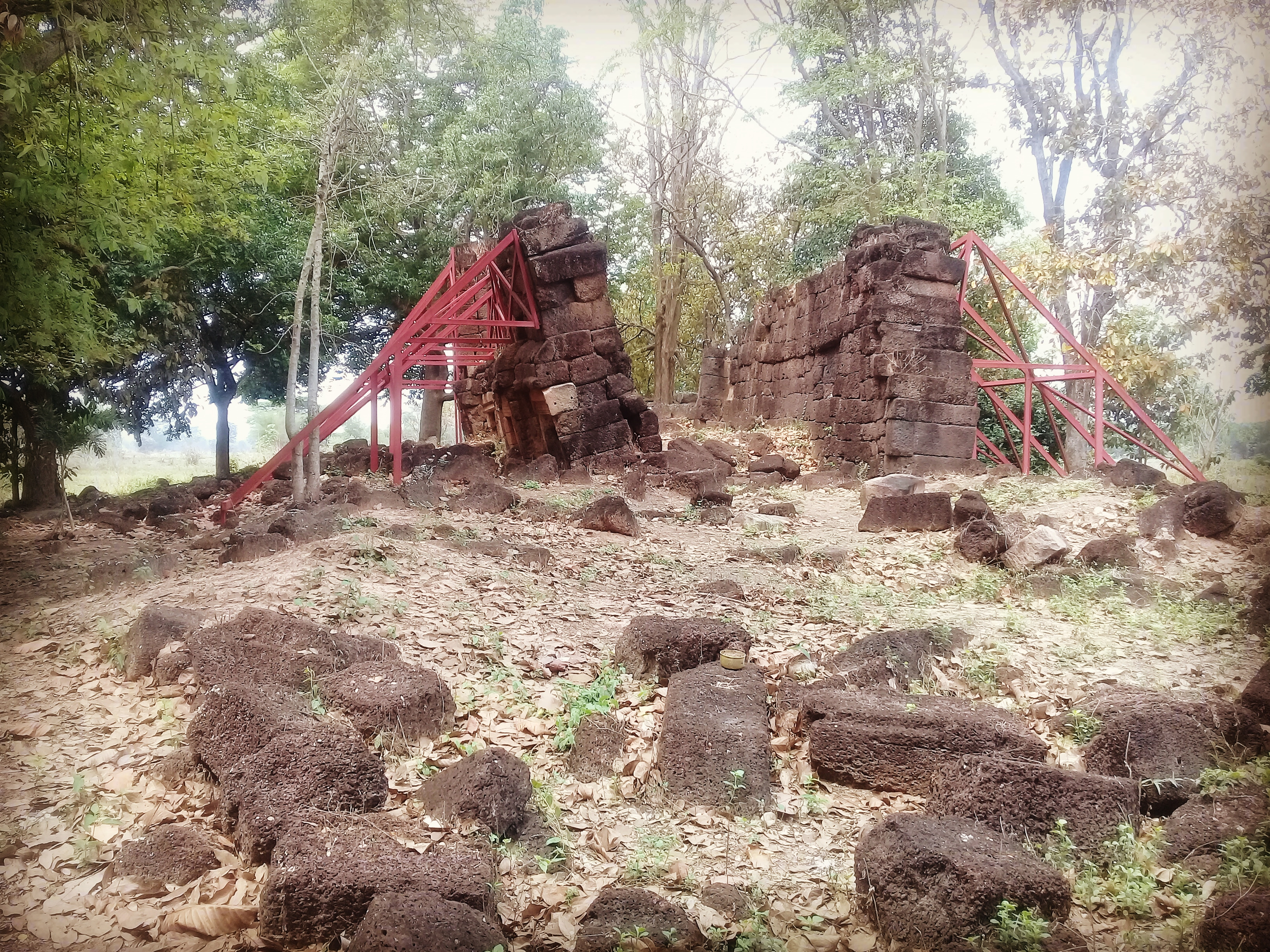 ปราสาทถมอ ปราสาทหินเก่าแก่สันนิษฐานว่าเป็นธรรมศาลา สร้างขึ้นราวพุทธศตวรรษที่ 18